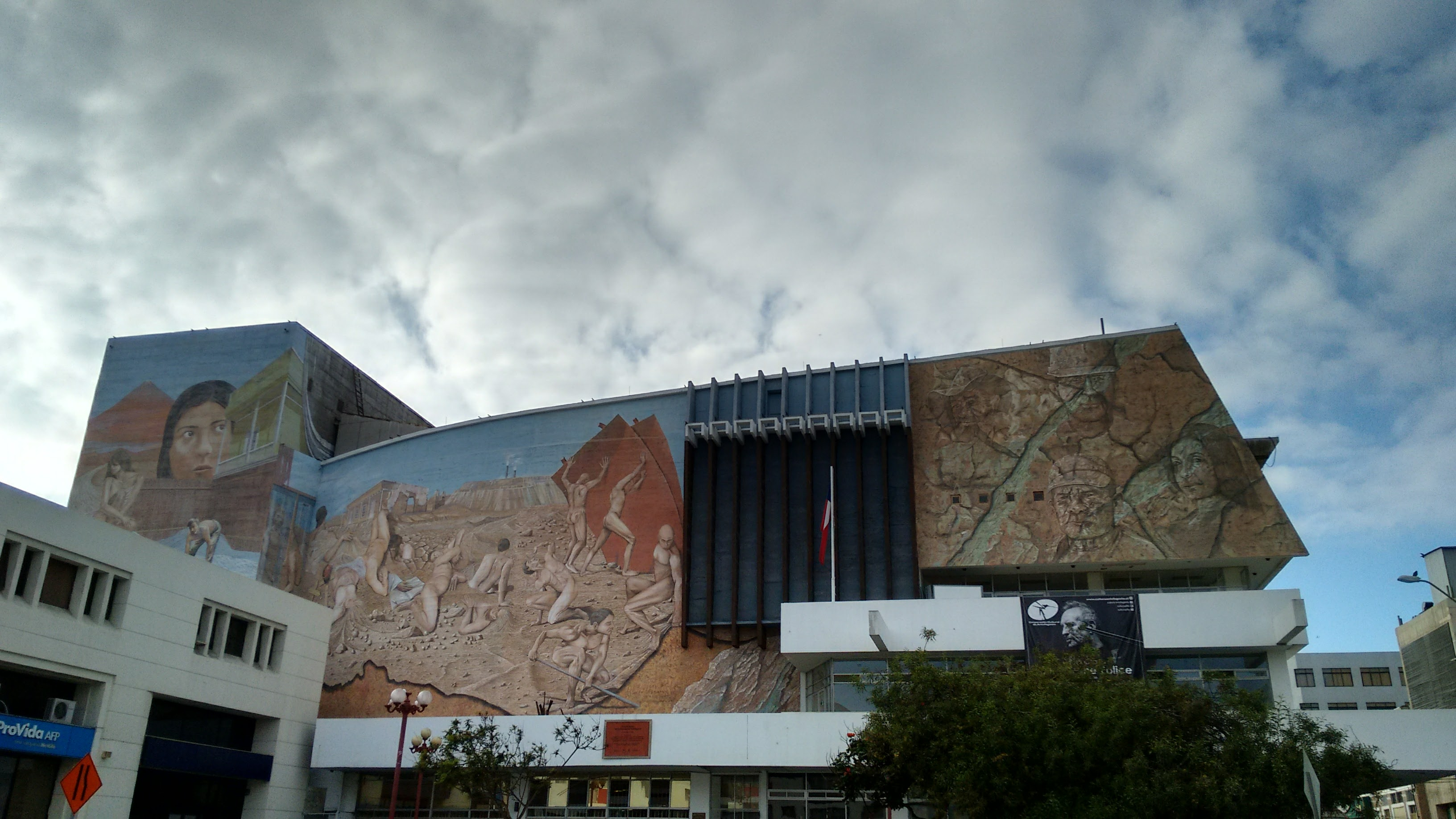 Mural histórico del Teatro Municipal de Antofagasta. Antofagasta, Chile.